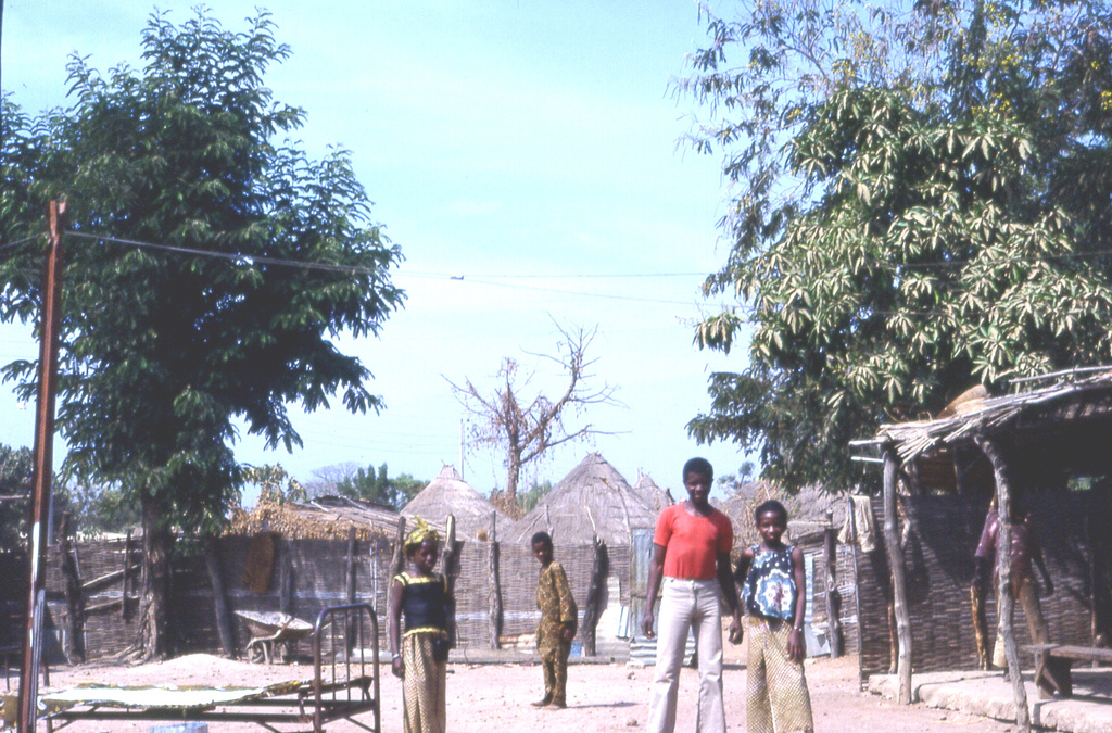 Kedougou (Senegal)